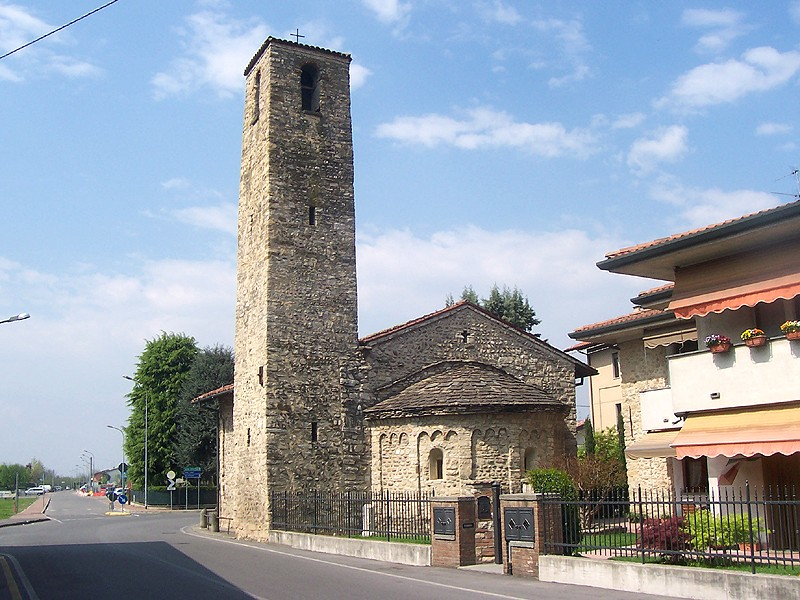 Cividino - Abside della Chiesa di S. Giovanni Battista